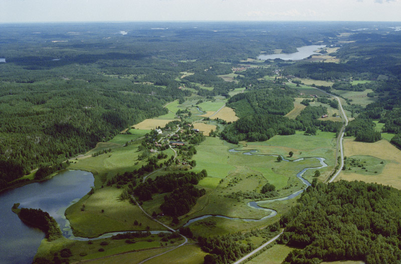 Uknadalen, Gärdserums kyrkby i bildens mitt. Bilden är tagen mot (väderstreck): SO Motiv: Gärdserum Nyckelord: Flygbilder, Riksintressen Kategori: Insjömiljöer, Dalgångsbygd Uknadalen, Gärdserums kyrkby i bildens mitt. Bilden är tagen mot (väderstreck): SO.